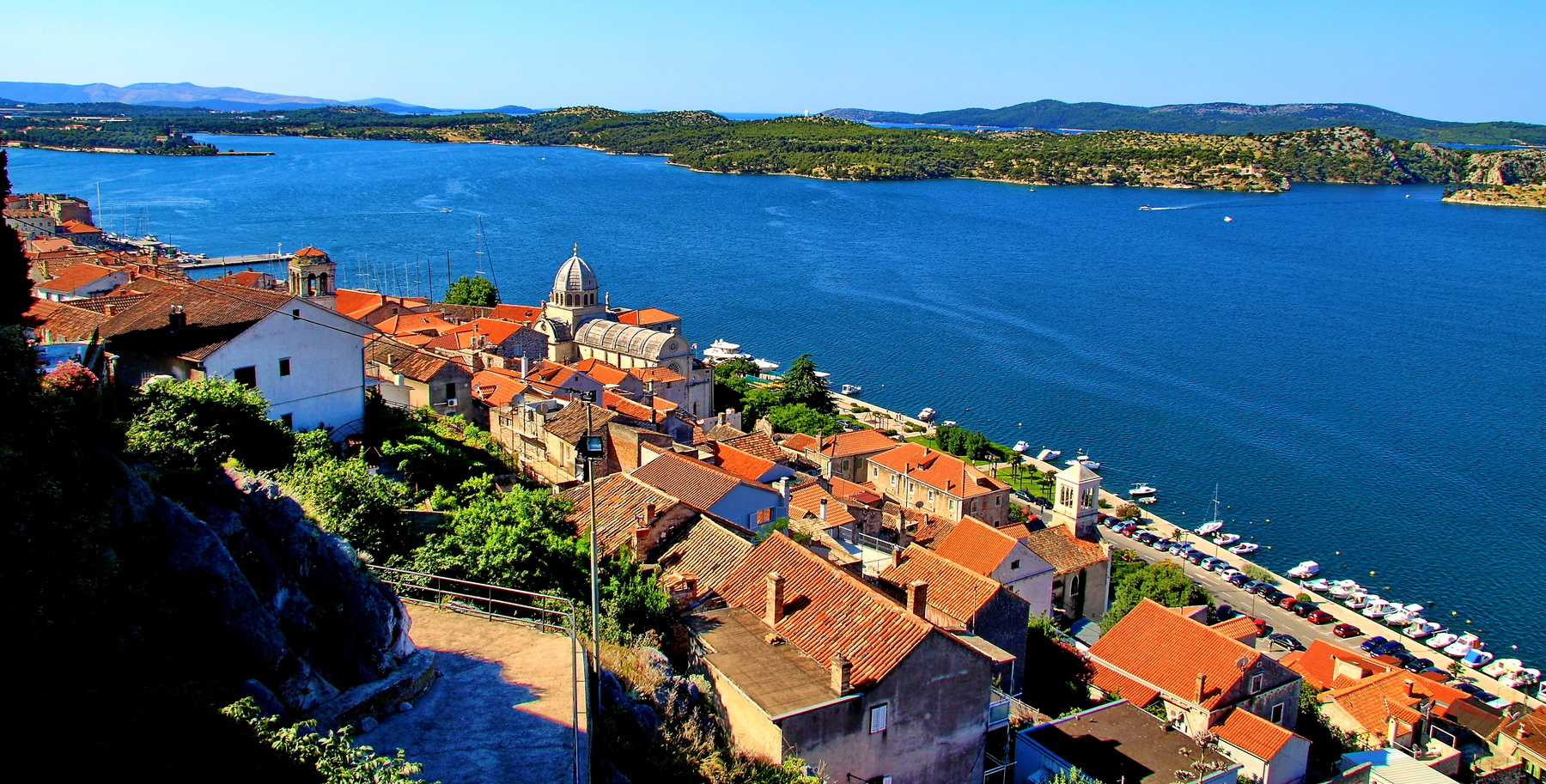 Šibenik. Pogled iz trdnjave na levo stran zaliva.